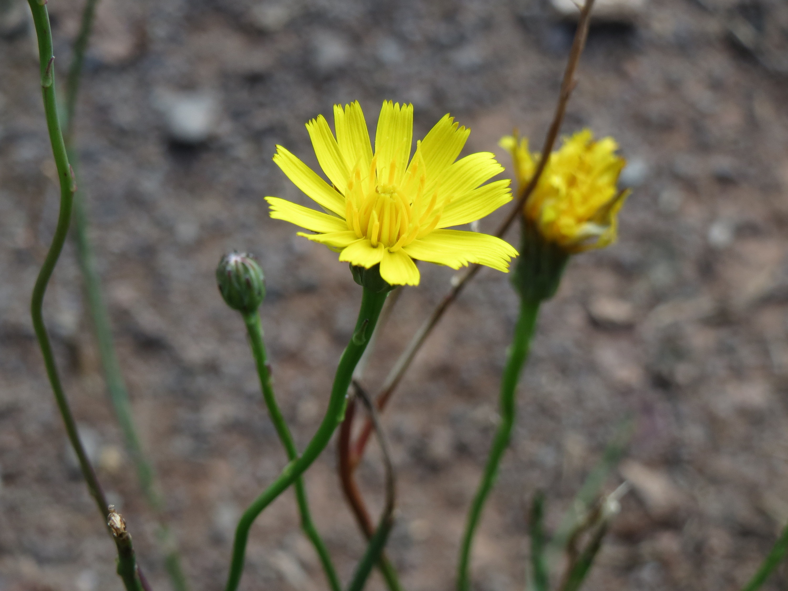 WiesenGewöhnliches Ferkelkraut (Hypochaeris radicata) in Saarbrücken